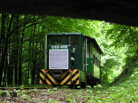 C-50 vontatta szerelvény Mahóca felé (Lillafüredi Állami Erdei Vasút)